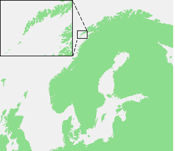 Lofoten Islands